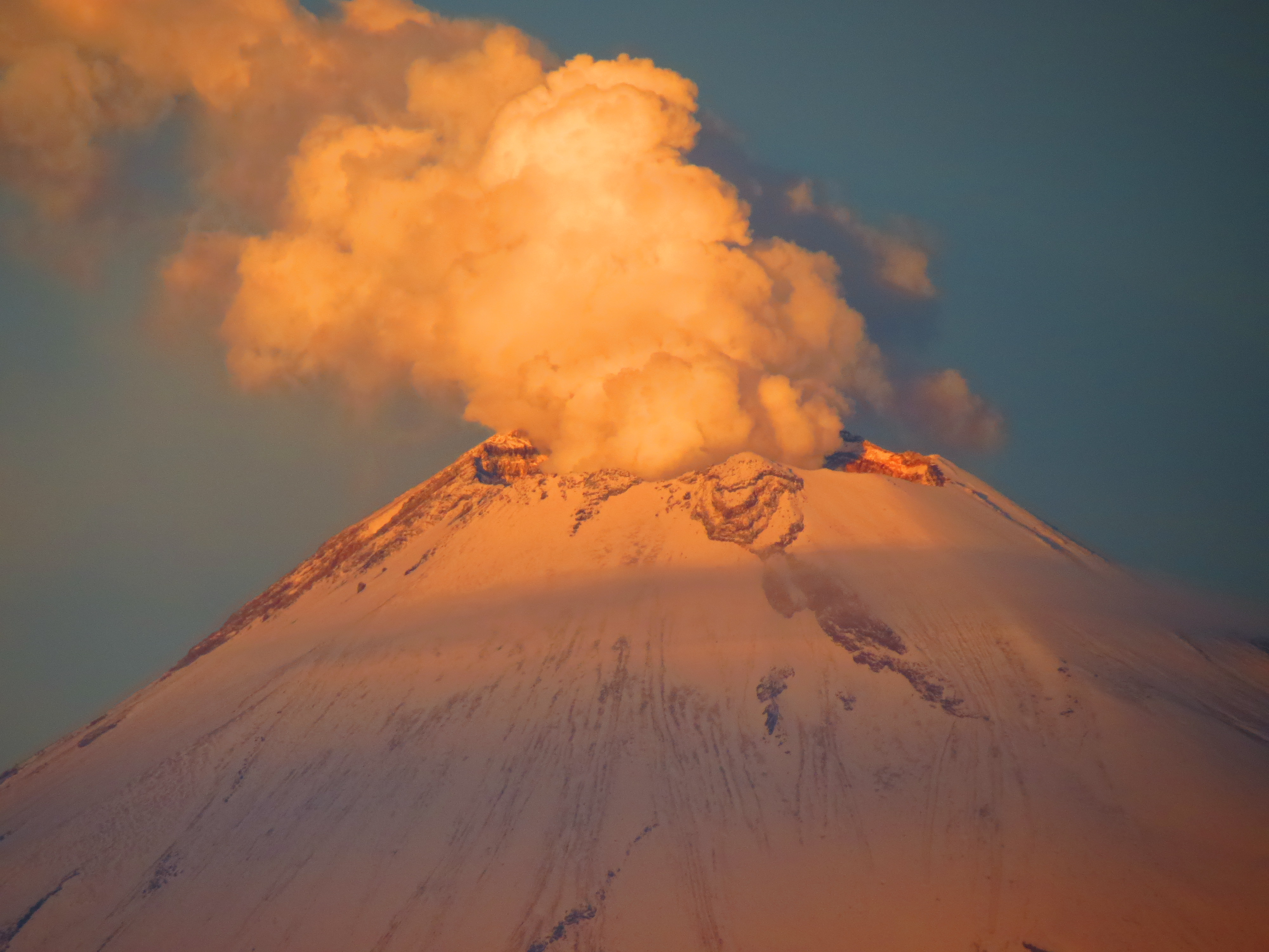 Fumarola del Popocatépetl (octubre, 2012)